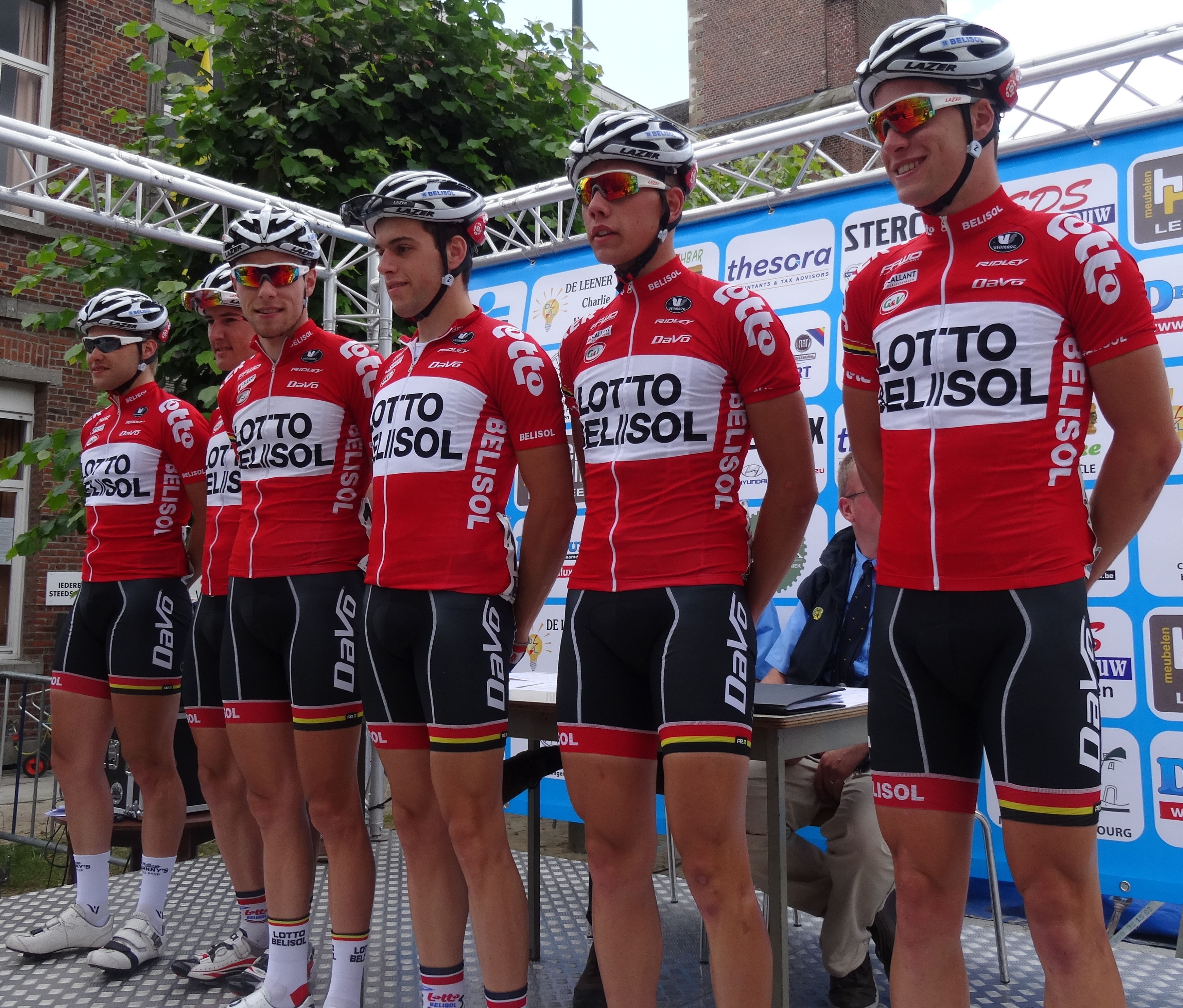 Reportage photographique réalisé le mercredi 25 juin à l'occasion du départ et de l'arrivée de l'Internationale Wielertrofee Jong Maar Moedig 2014 à Oetingen (Gooik), Belgique.